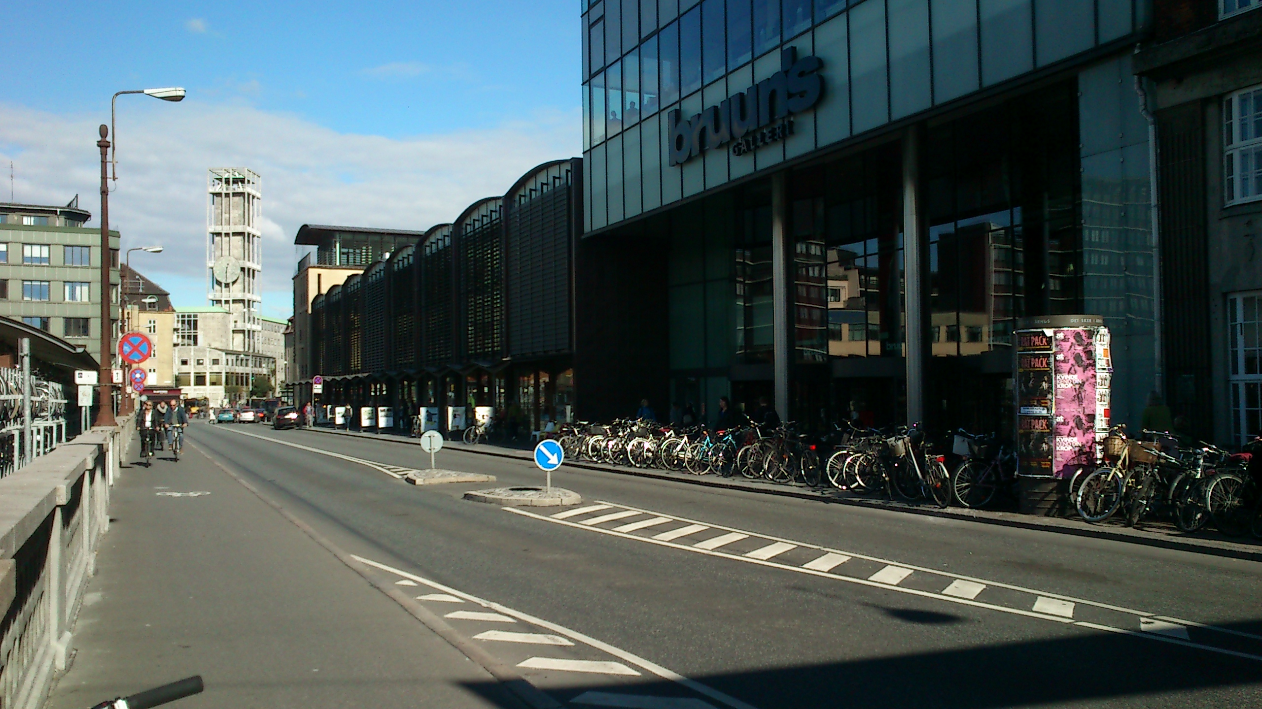 Indgangspartiet til Bruun's Galleri fra Bruunsgade. Bruun's Arkade fortsætter langs Bruuns Gade til det gule Banegårdshus.